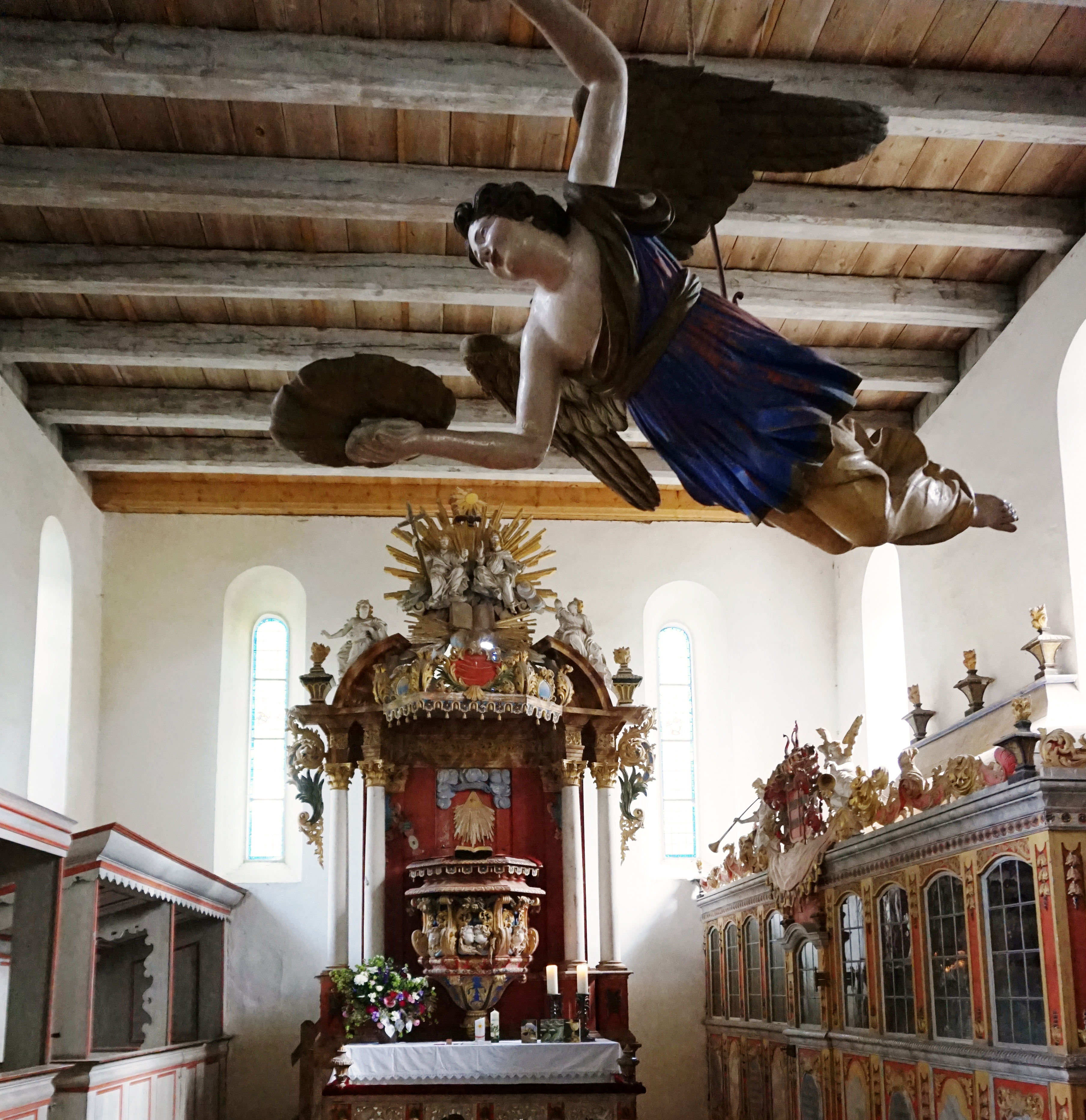 Innenansicht der Kirche von Sternhagen (Nordwestuckermark) mit Taufengel, Kanzel und Logen der Familie von Arnim